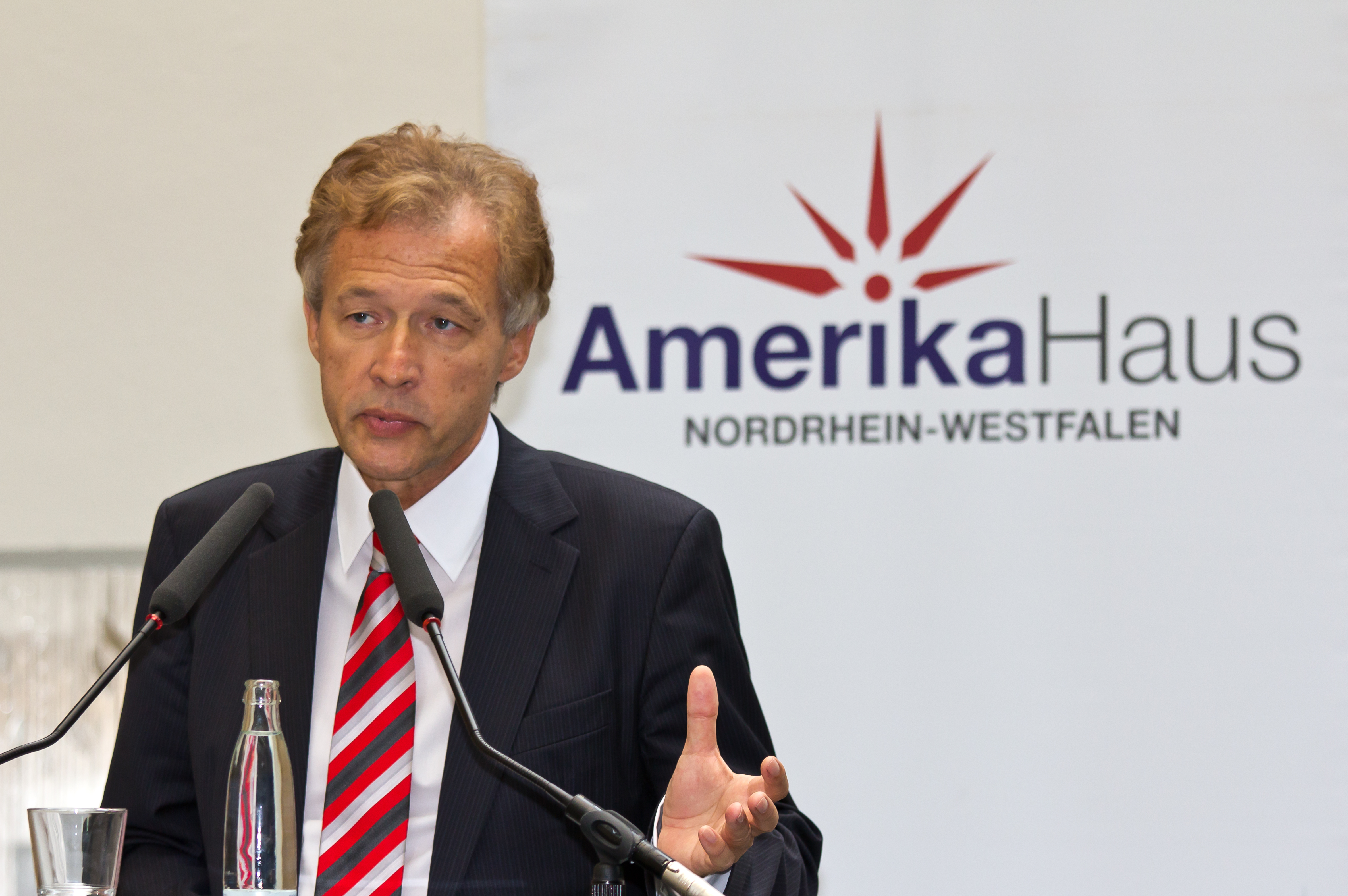 Amerika Haus Köln - Town Hall Meeting in der Piazzetta des Historischen Rathauses von Köln mit dem deutschen Botschafter in den USA, Dr. Peter Ammon. Foto: Dr. Peter Ammon berichtet von den USA vor der Wahl